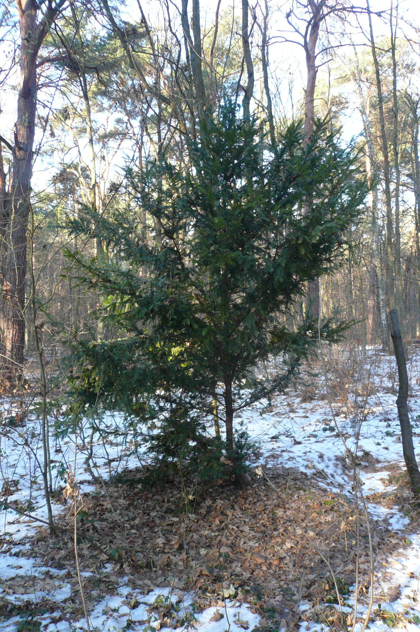 Największy znany dotąd okaz cisa w Lesie Bemowskim